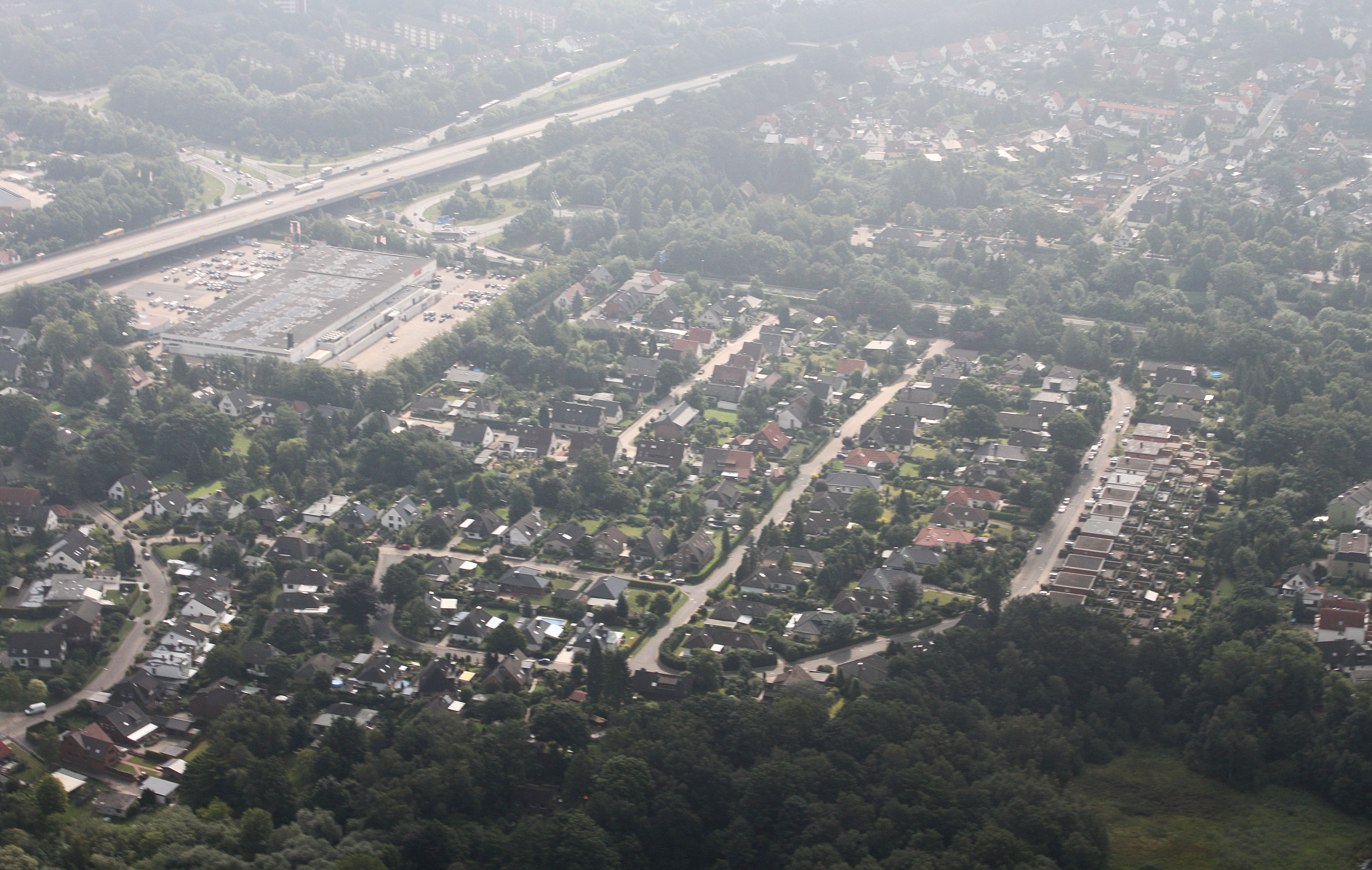 Fotoflug Bremen; Flughöhe 500 m; von der Autobahnabfahrt der A 27 in Bremen-Nord über Vegesack zum U-Boot Bunker Valentin